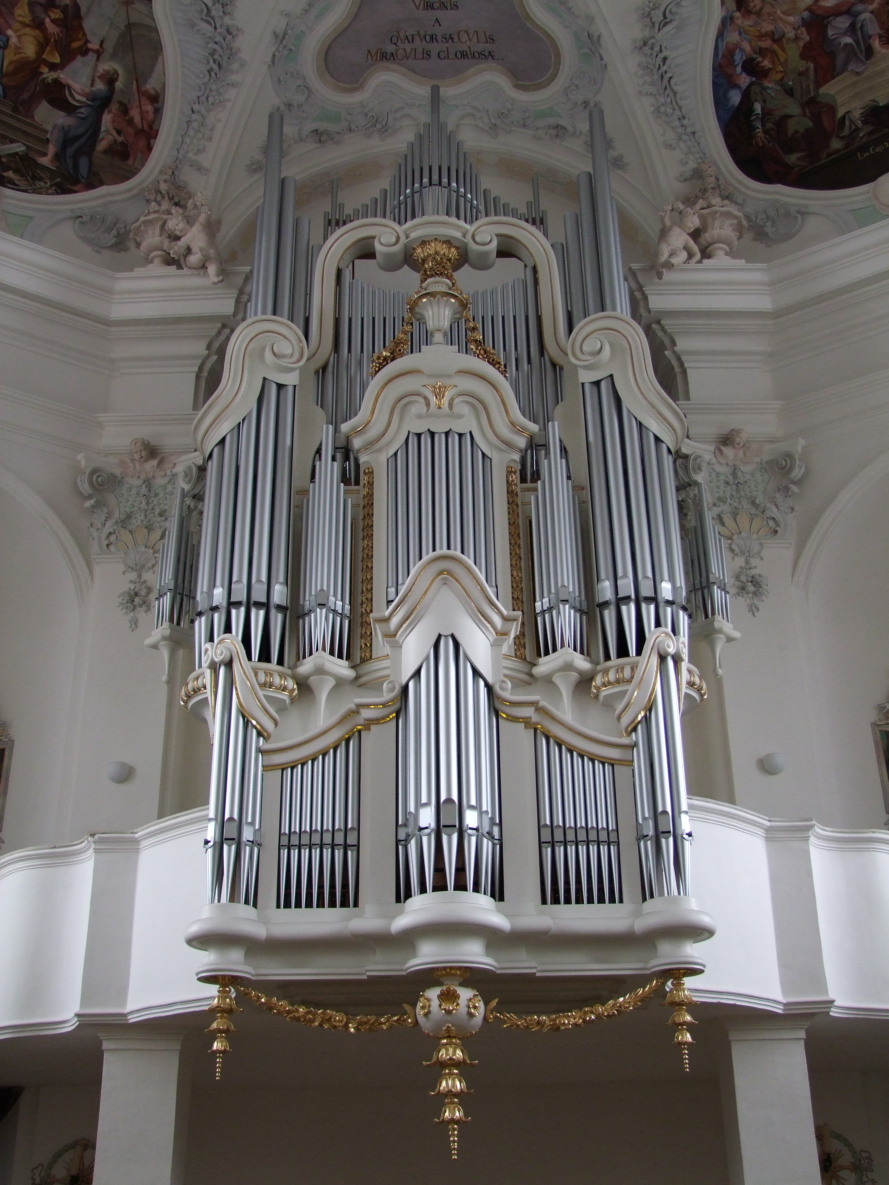 Mariä Geburt im oberschwäbischen Witzighausen, einem Ortsteil der Stadt Senden in Bayern.